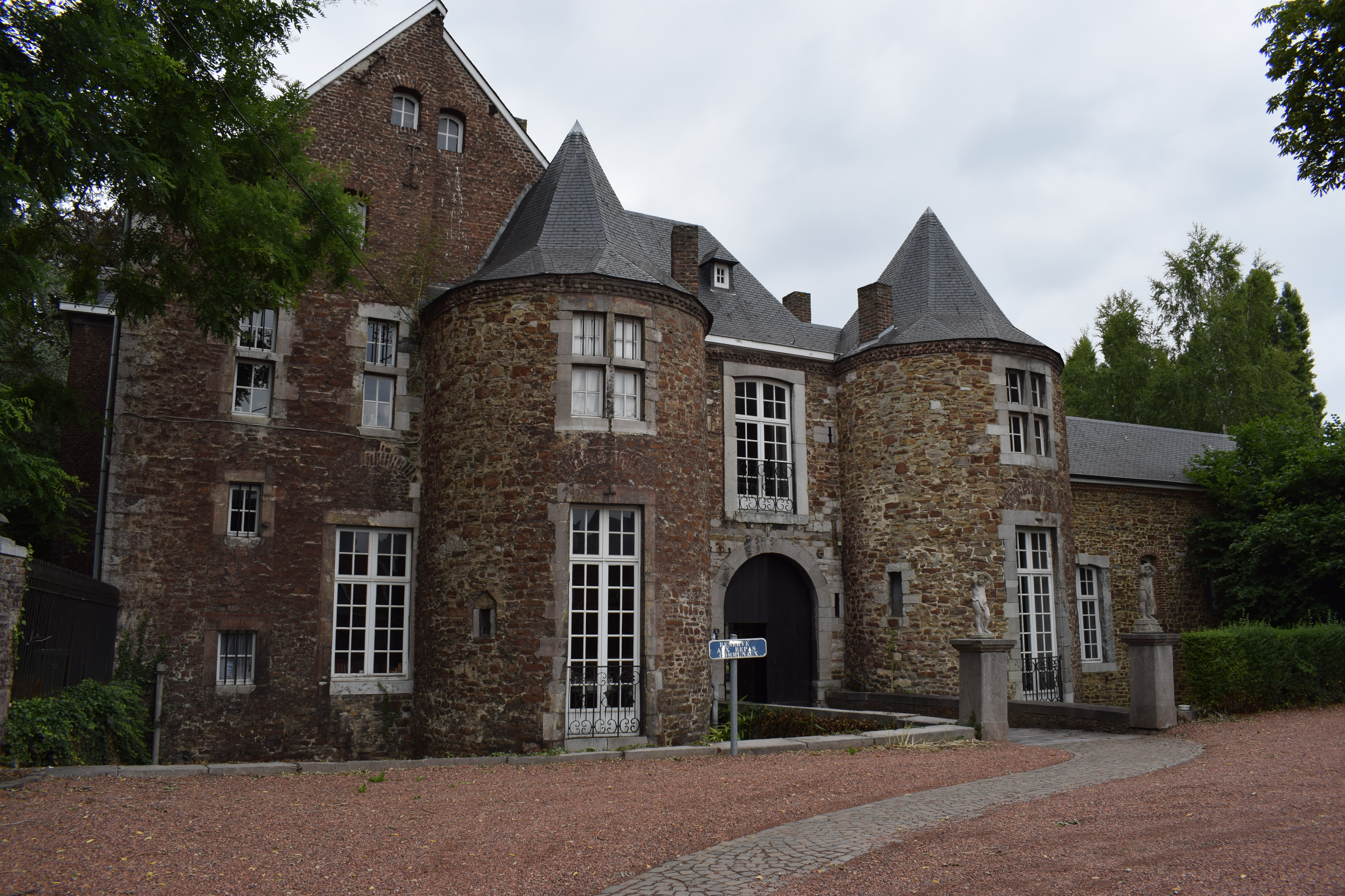 Vue de Jemeppe-sur-Meuse, dans la commune de Seraing (province de Liège, en Belgique).